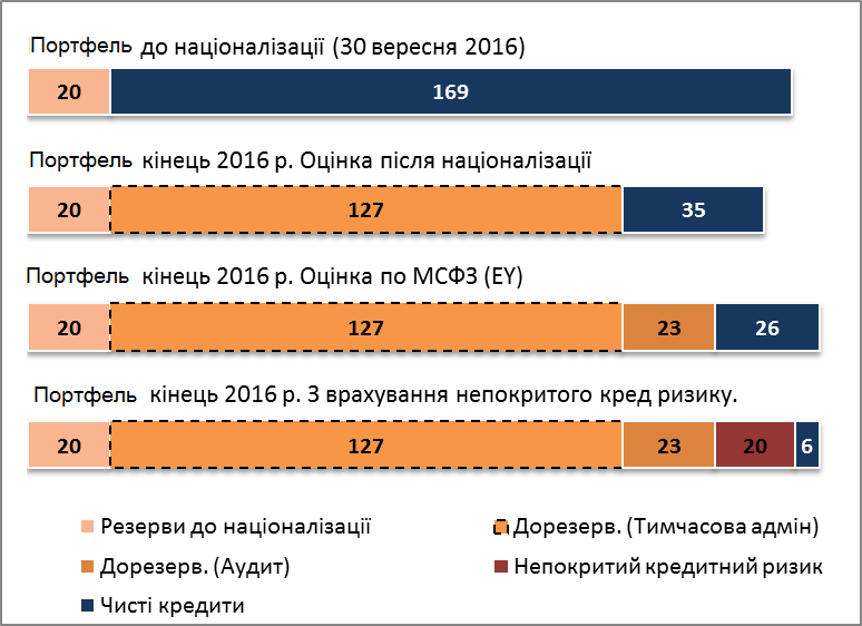 Як змінювалася оцінка портфелю кредитів (юридичні особи)